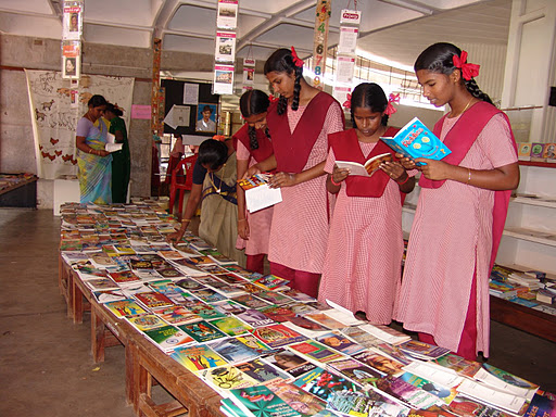 குழந்தைகளுக்கான புத்தகத் திருவிழாவில் ஒரு காட்சி.